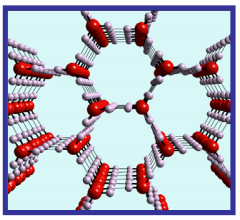 Izotzaren egitura